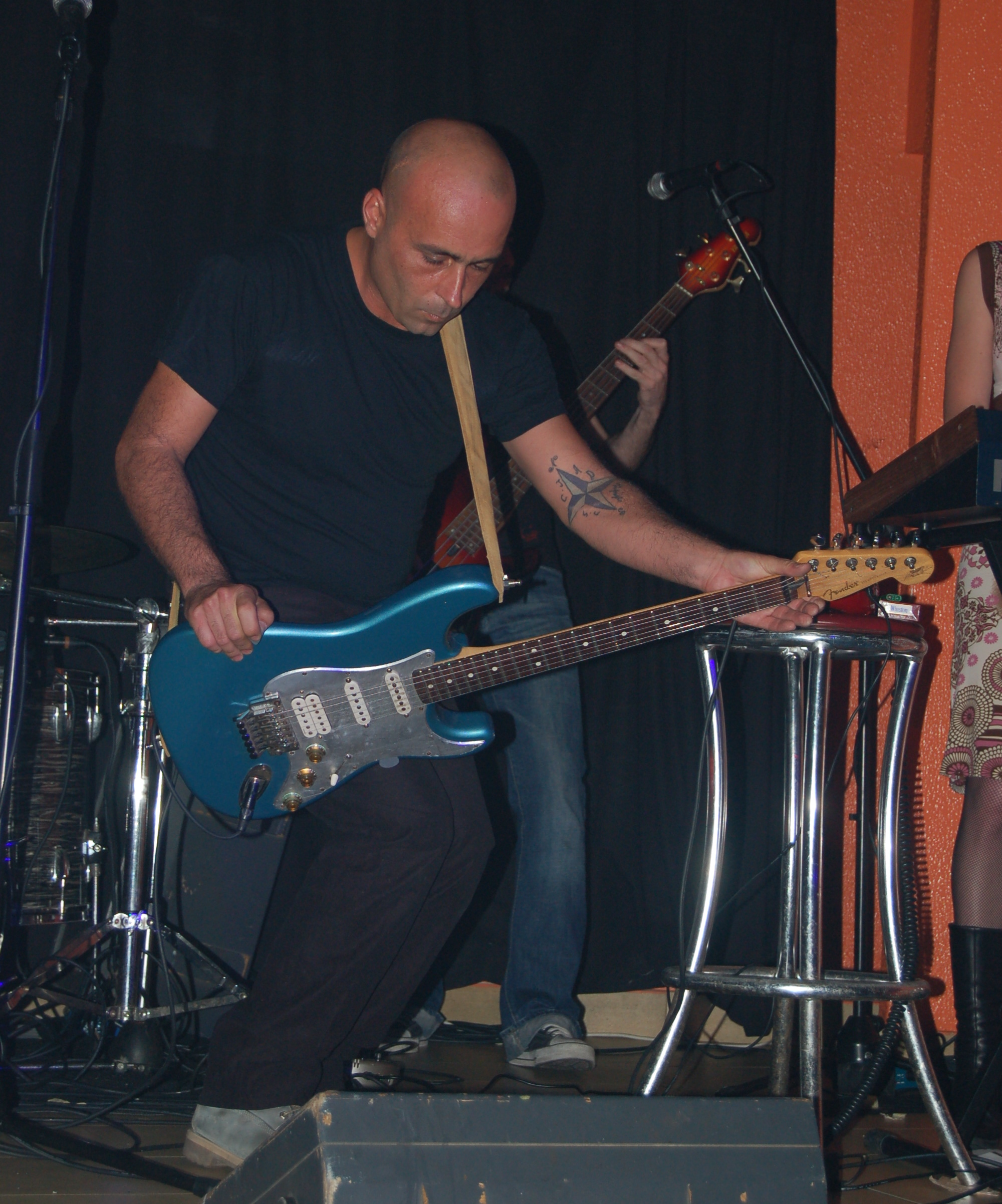 Corcobado en Pontevedra